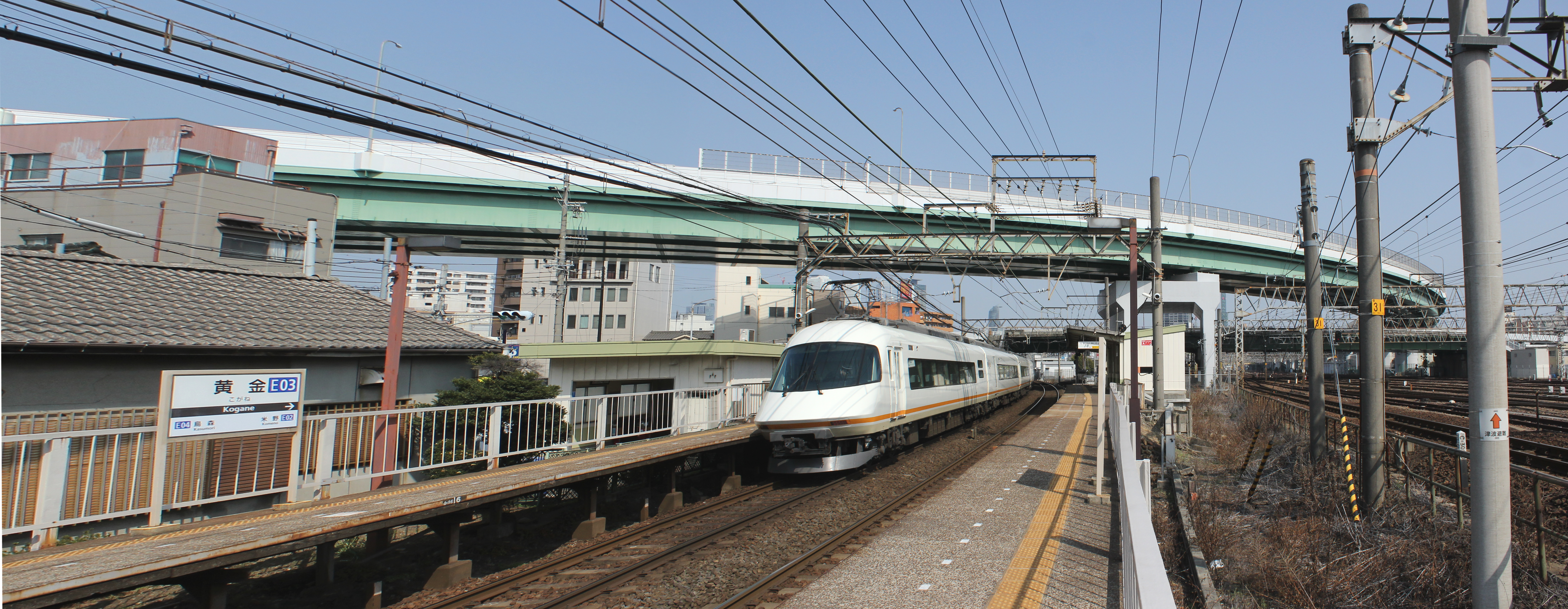 名古屋高速5号万場線 黄金跨線橋（左右2枚からなる合成写真）